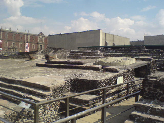 Recorrido de visita al Templo Mayor, inicio.